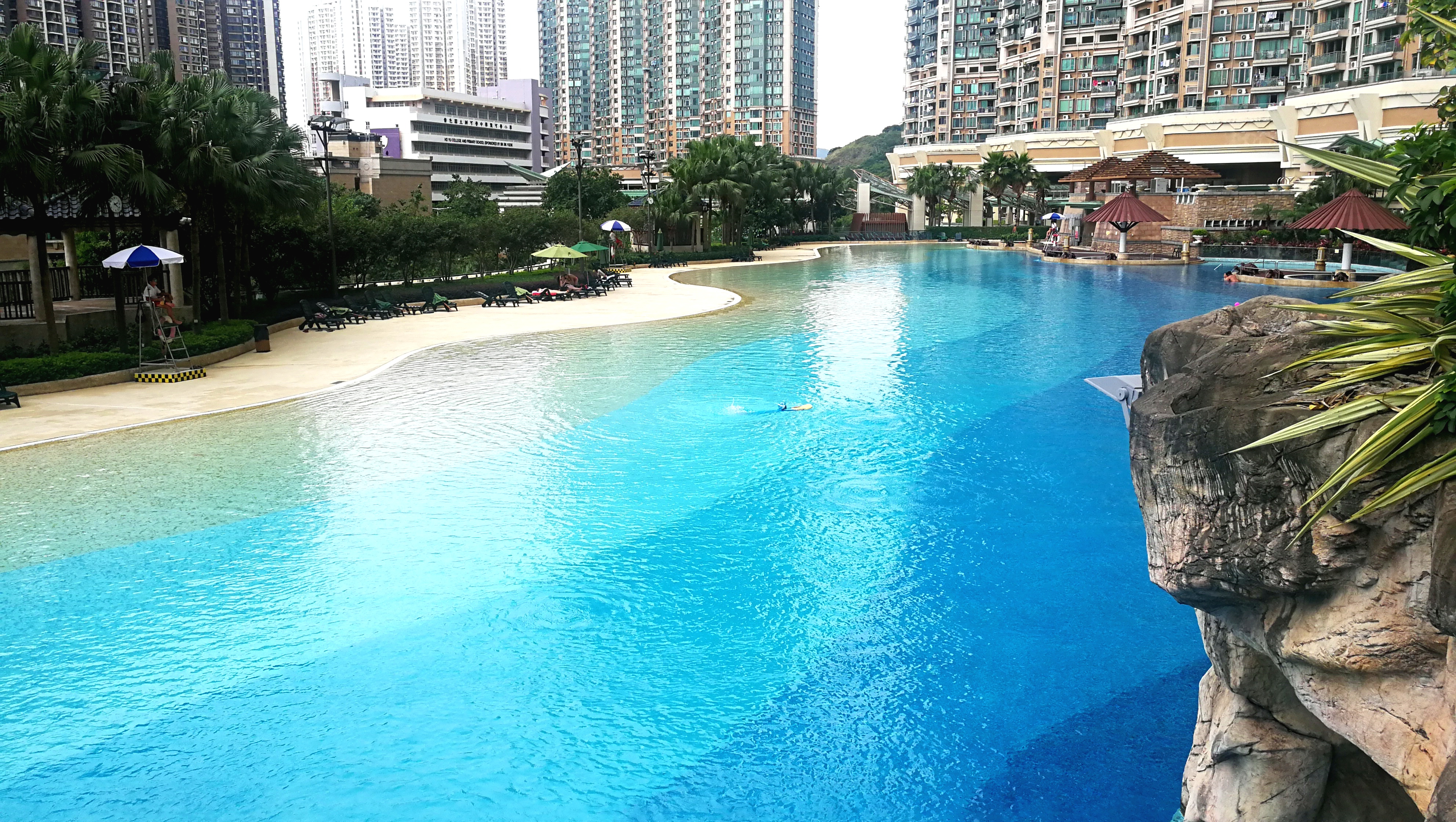 映灣園游泳池